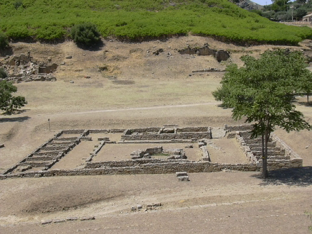 Morgantina: il Macellum, il mercato coperto, con tolos centrale, è l'unico edificio di epoca romana nell'agorà.